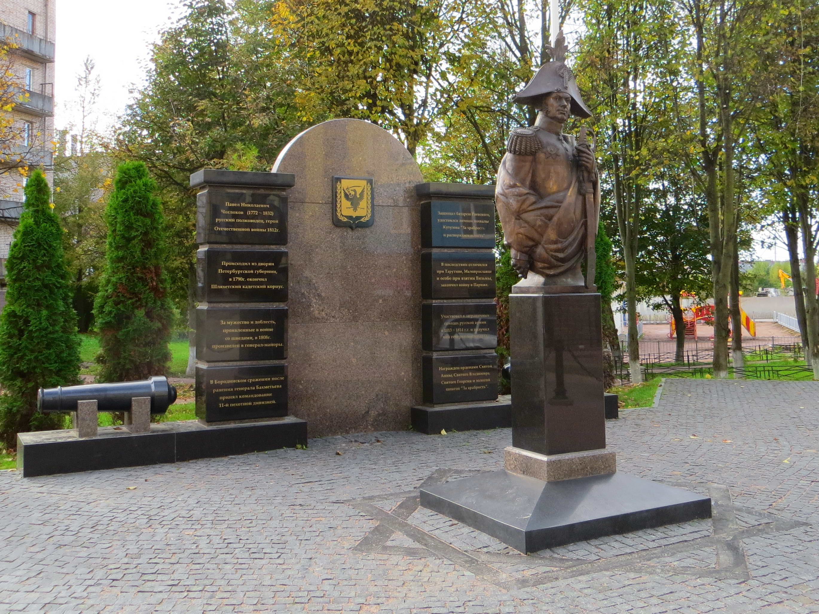 Памятник генералу П. Н. Чоглокову в деревне Старая Всеволожского района